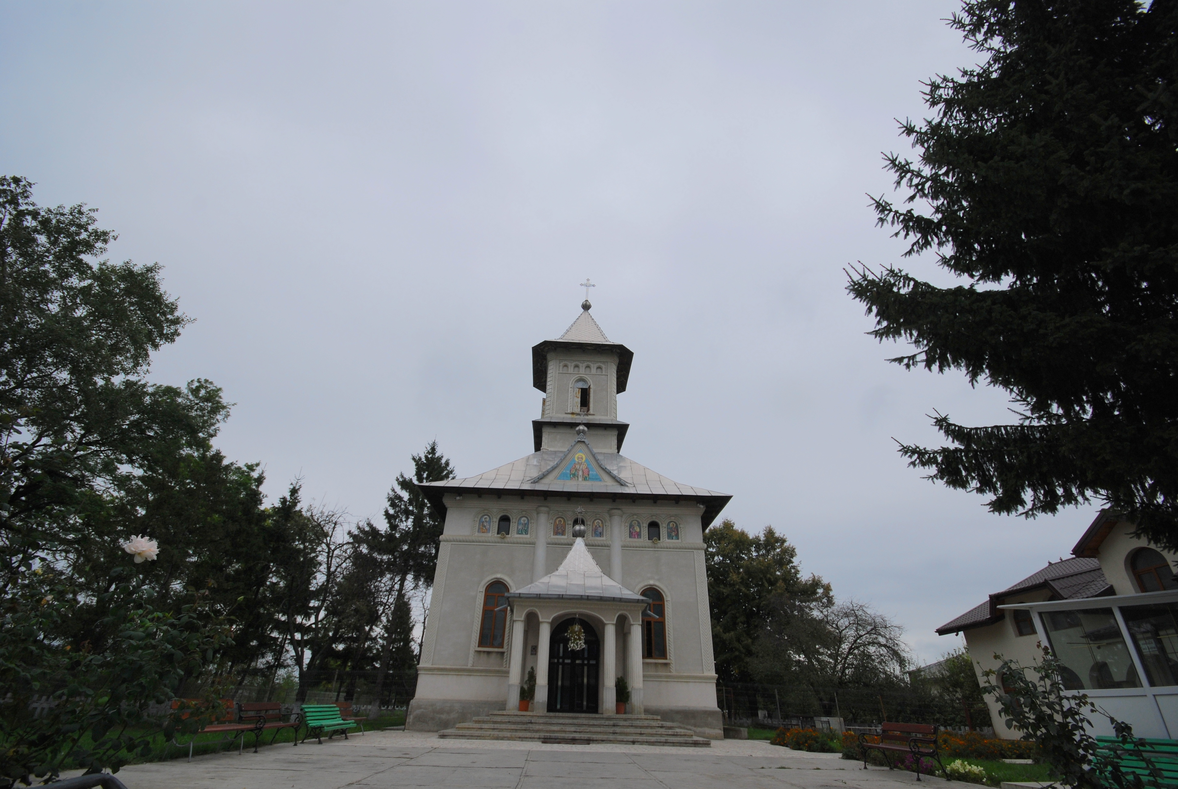 Biserica "Sf. Nicolae"